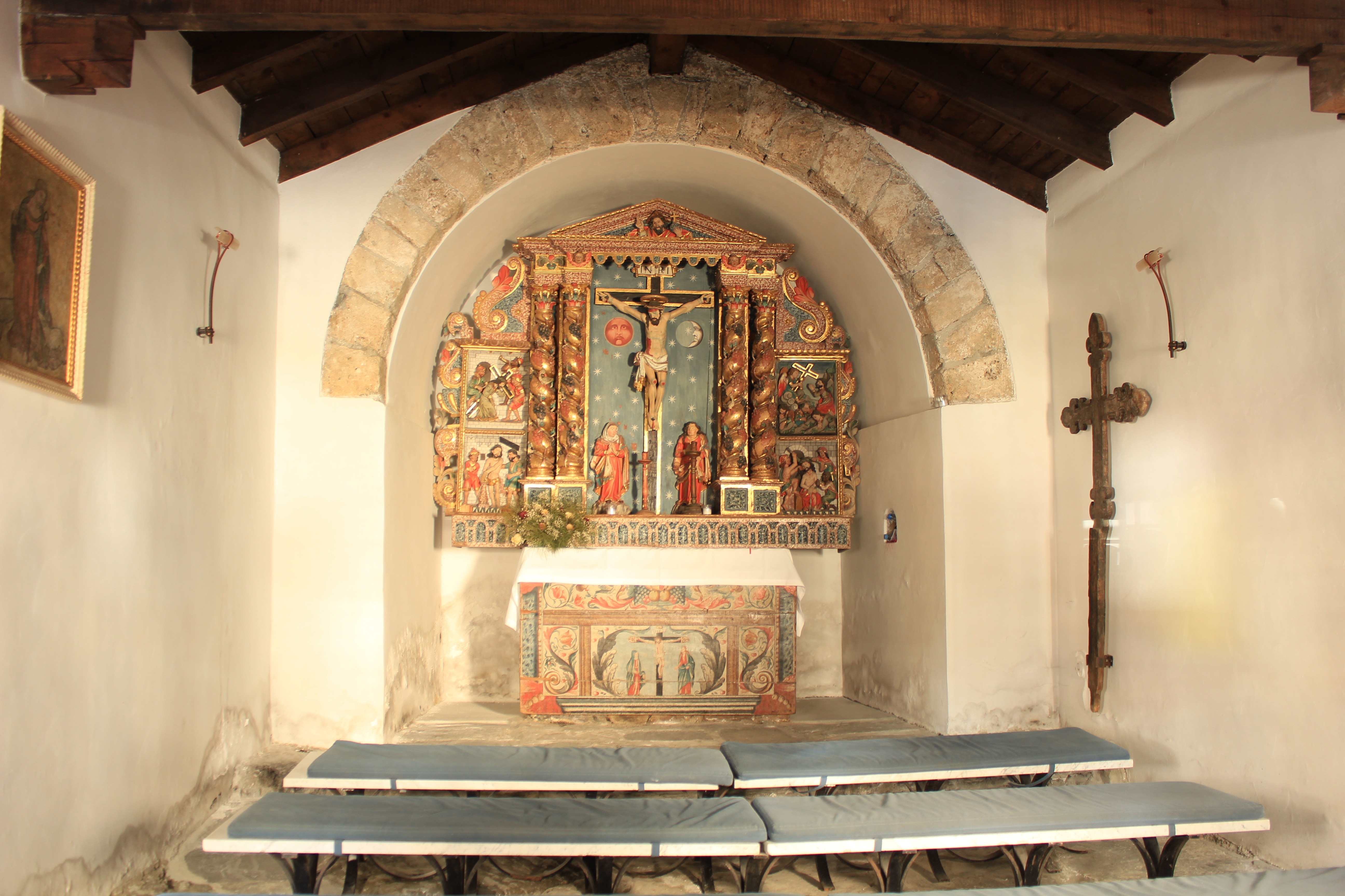 Església de la Santa Creu (Canillo)